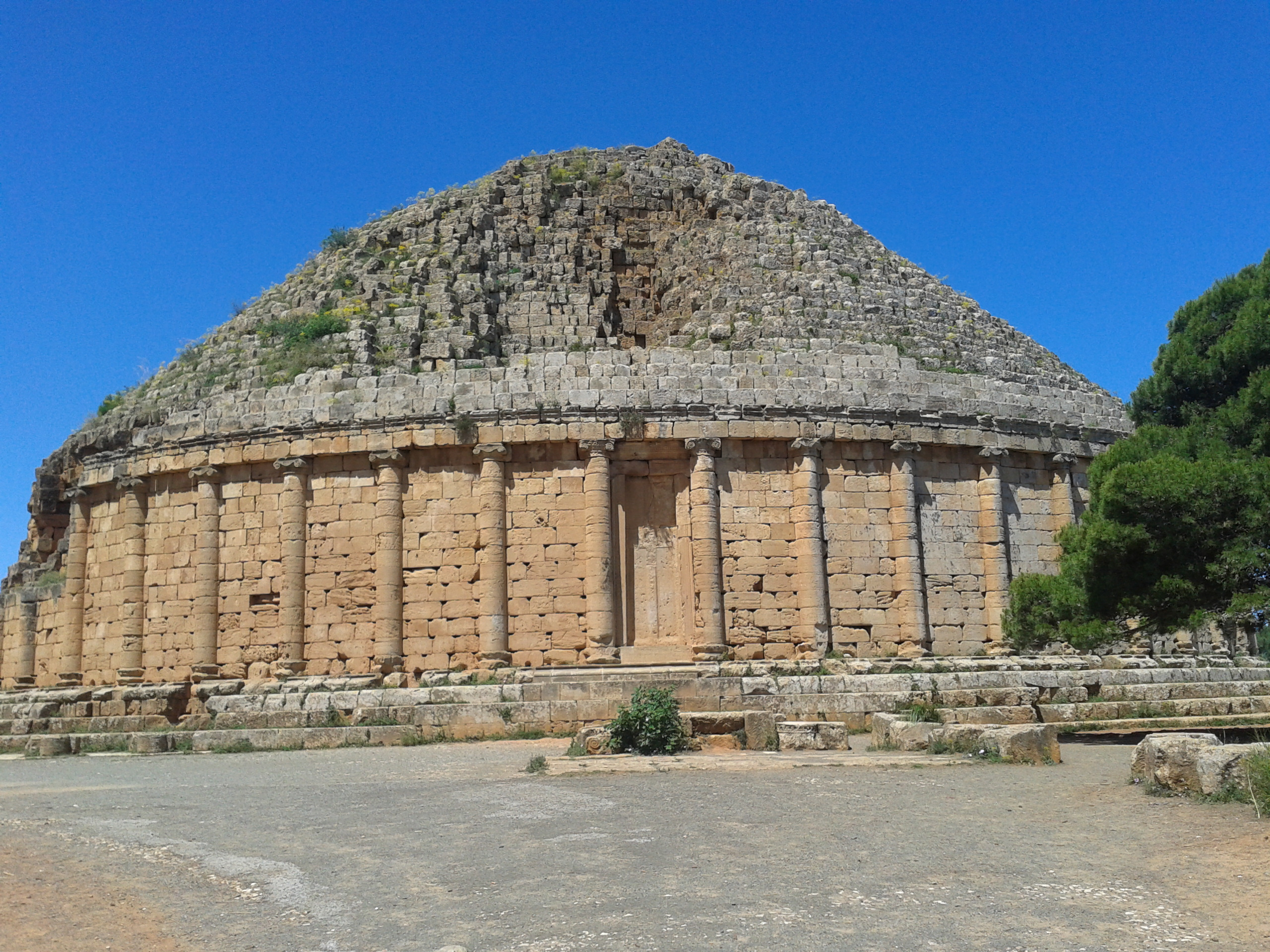 L'édifice, un tumulus de pierre d'environ 80 000 m3, ressemble de loin à une énorme meule de foin. Il mesure 60,9 mètres de diamètre et 32,4 m de hauteur. Érigé non loin de Tipaza (près du village de Sidi Rached), sur une crête des collines du Sahel algérois, il domine la plaine de la Mitidja à 261 mètres d'altitude